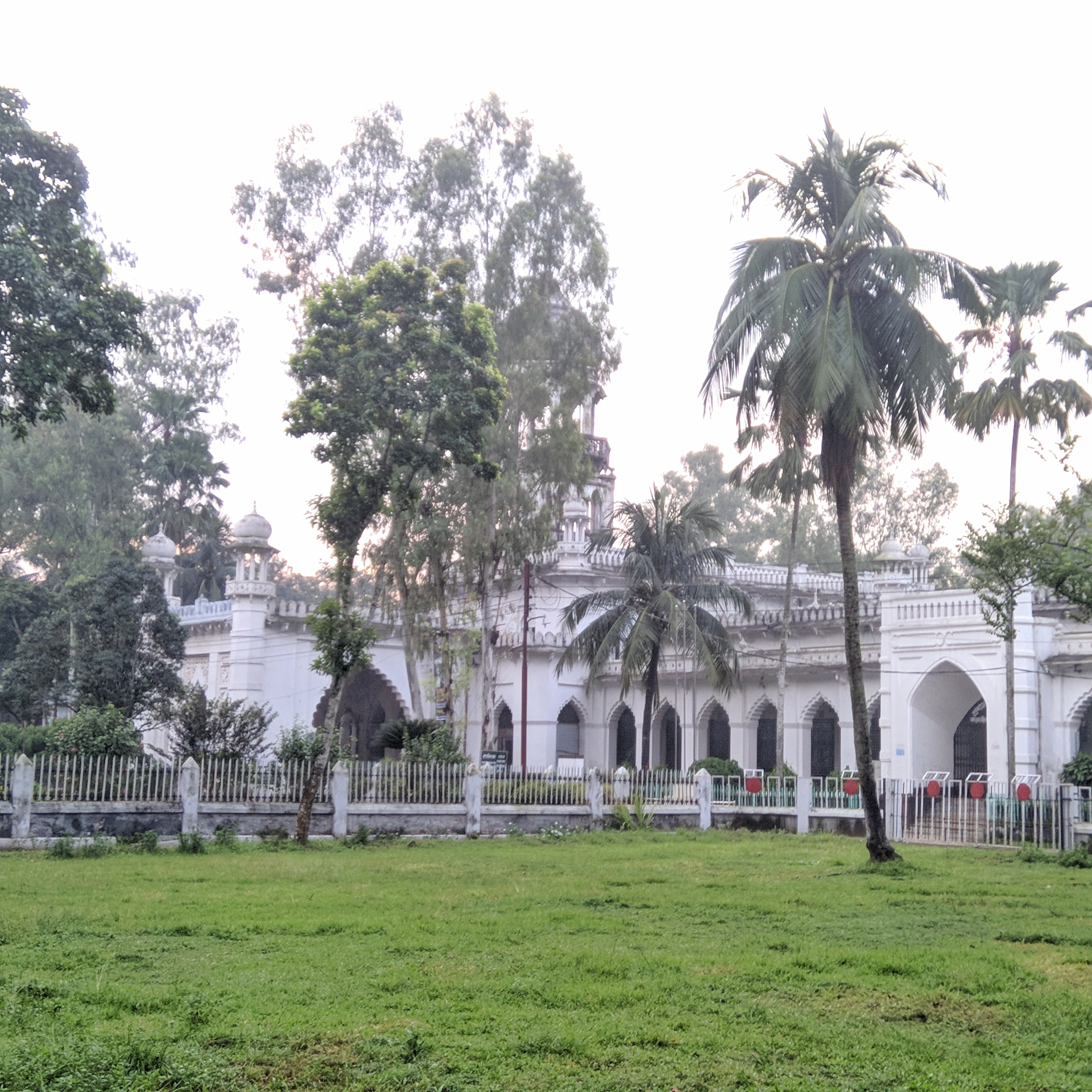 কারমাইকেল কলেজ, রংপুর। একটি ঐতিহাসিক এবং উত্তরবঙ্গের শ্রেষ্ঠ কলেজ, যেটি রংপুর শহরের লালবাগে অবস্থিত। ১৯১৬ এটি প্রতিষ্ঠিত হয়।